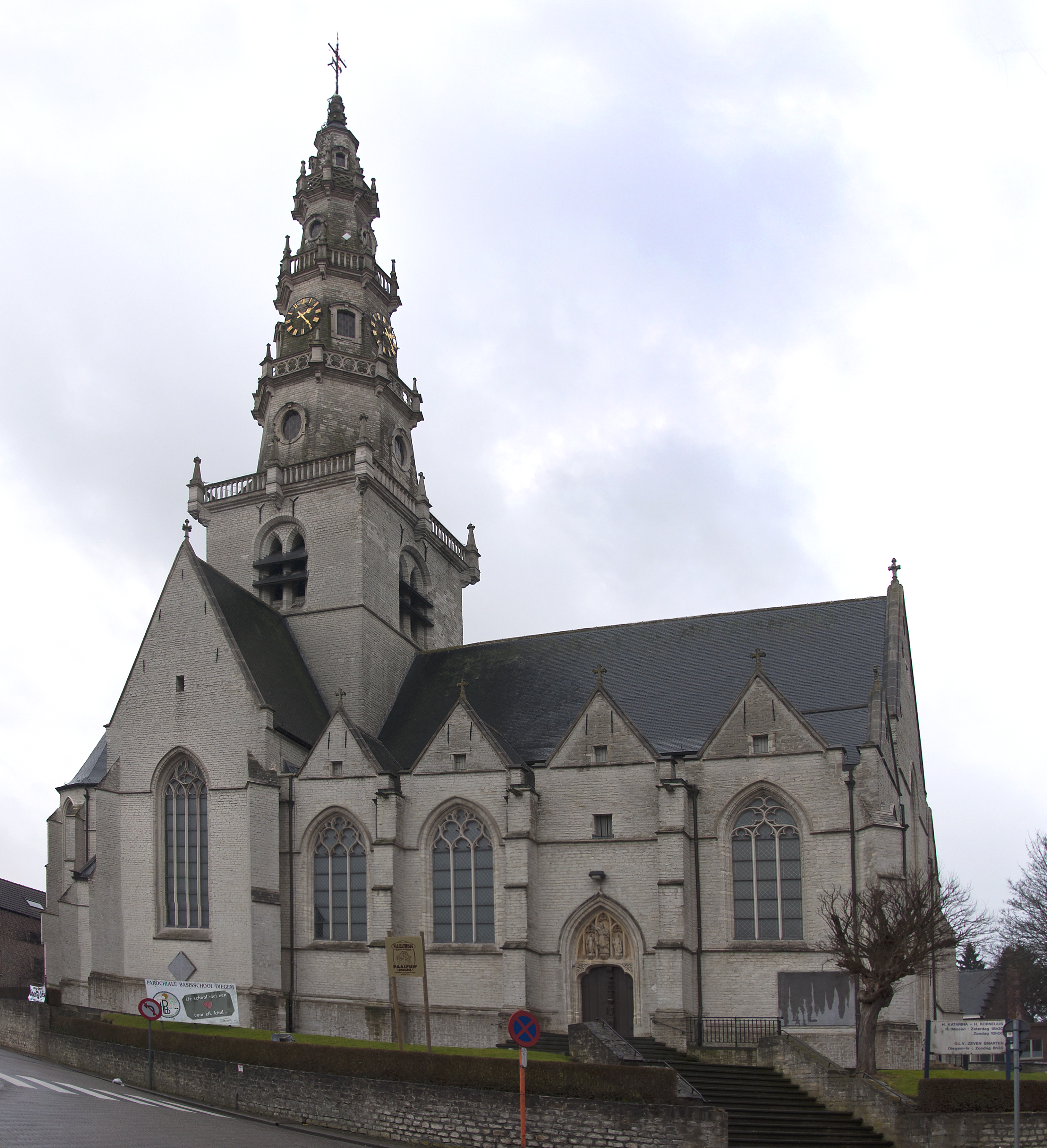 De Sint-Catharina en Sint-Corneliuskerk te Diegem, België